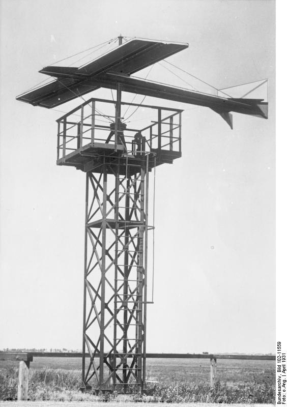 Das Flugzeug als Windrichtungsanzeiger! Im Flughafen Wien-Aspern ist eine Windfahne in Form eines Flugzeuges aufgestellt worden. Bei Nacht ist dieselbe erleuchtet, um den Flugzeugen die Windrichtung anzuzeigen.